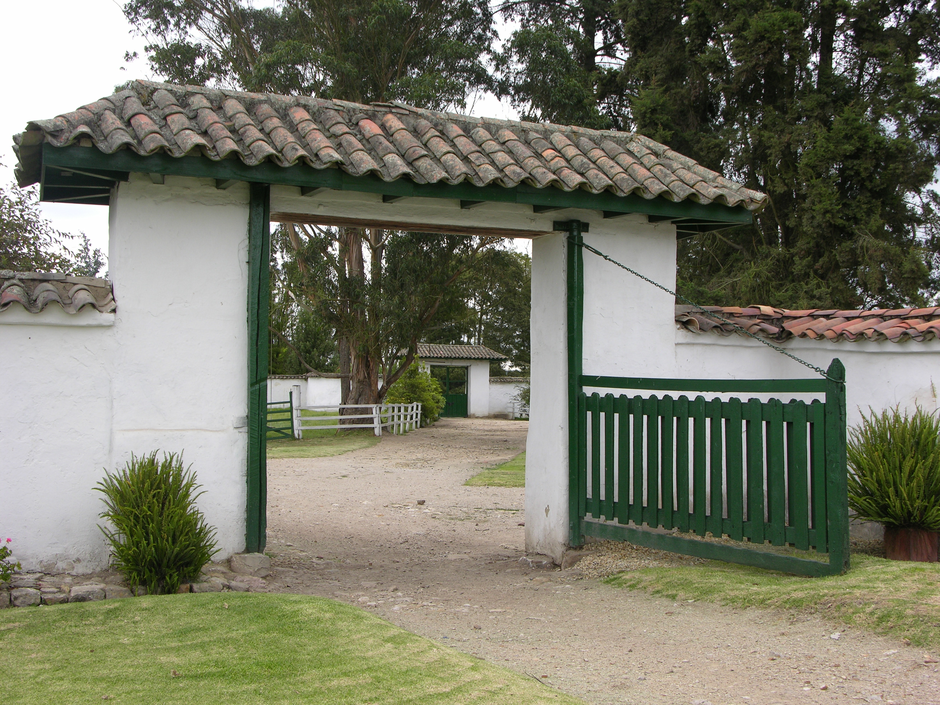 Vista de una de las puertas de la hacienda la Holanda en Mosquera Cundinamarca